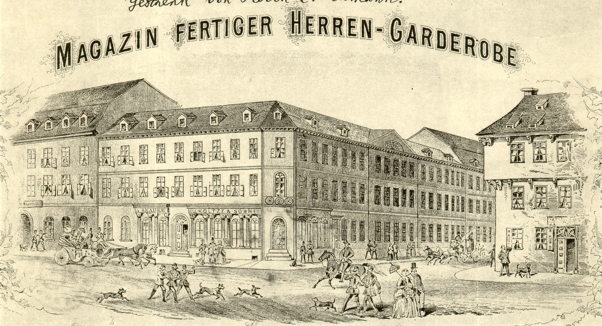 Eckhaus Weender Straße / Barfüßerstraße in Göttingen vor der Aufteilung und Aufstockung des Eckteils, rechts ein Teil der Ratsapotheke. Ehemaliger Standort des Kommandantenhauses. Geschäftshaus Fa. J. Koltze & Söhne, Abbildung auf dem Briefkopf dieser Firma. Lithographie, unbekannter Künstler, um 1850